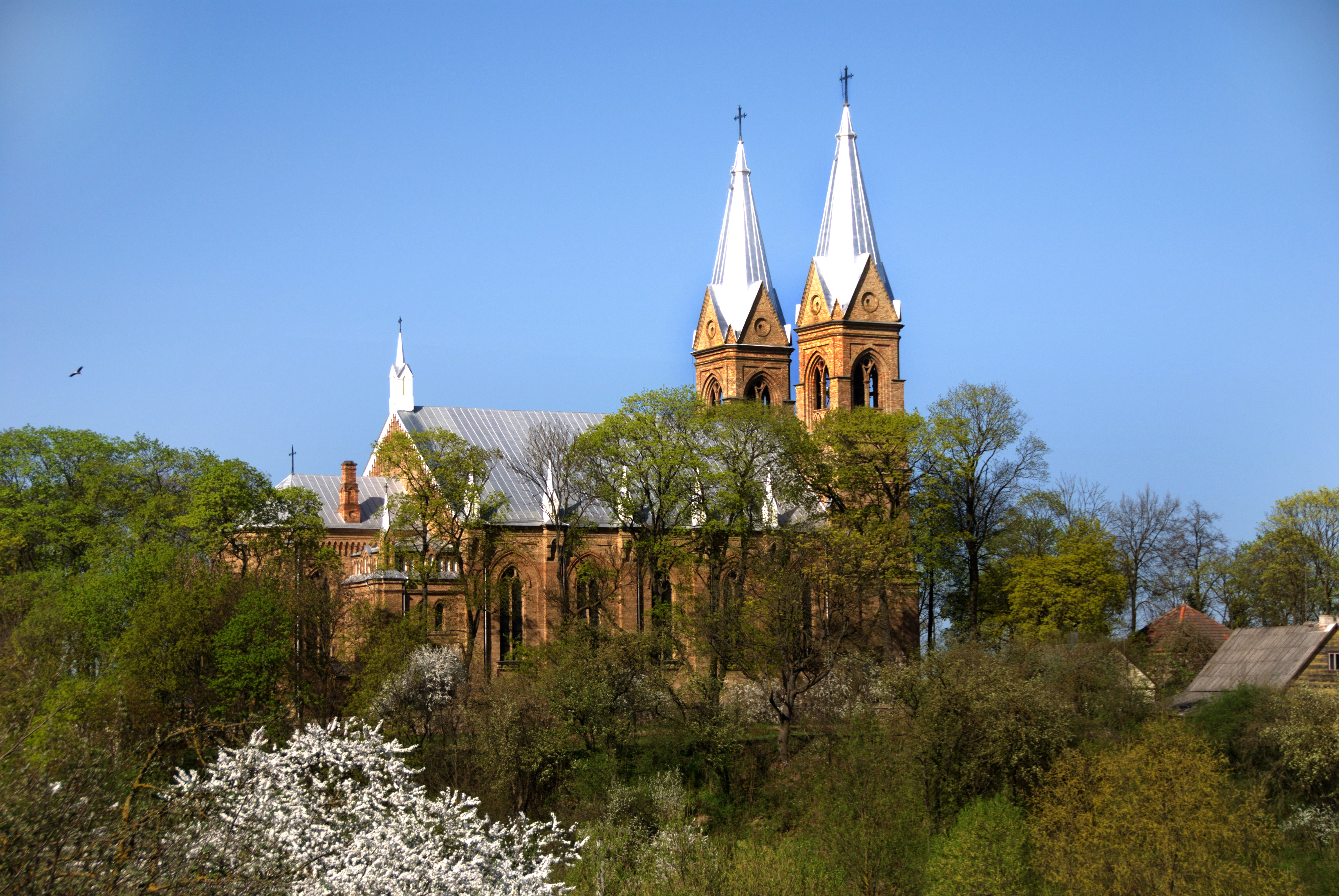 Krekenavos bažnyčia